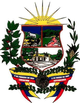 Escudo del municipio Andres Bello del estado Táchira y de su capital Cordero, en formato PNG. -En proceso de vectorización